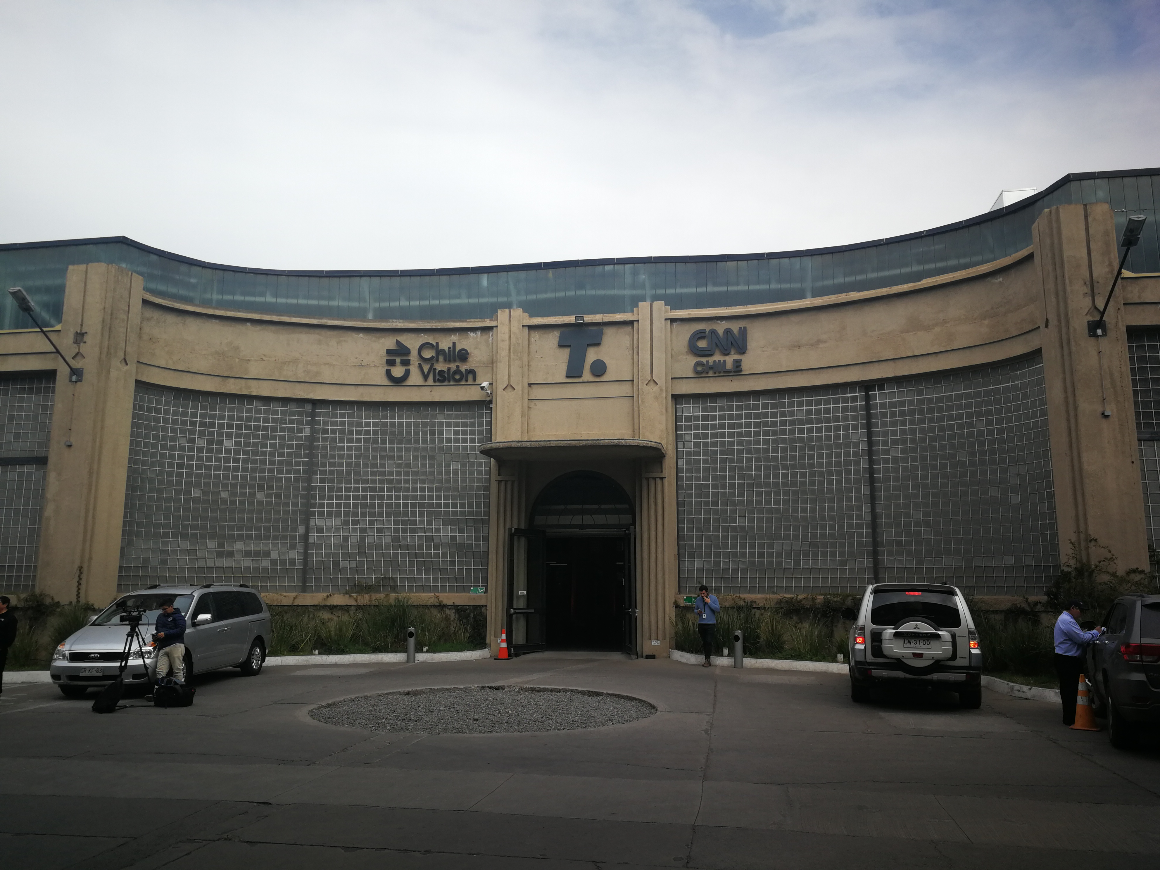 Edificio de Turner International Chile, que alberga los estudios de Chilevisión y CNN Chile.